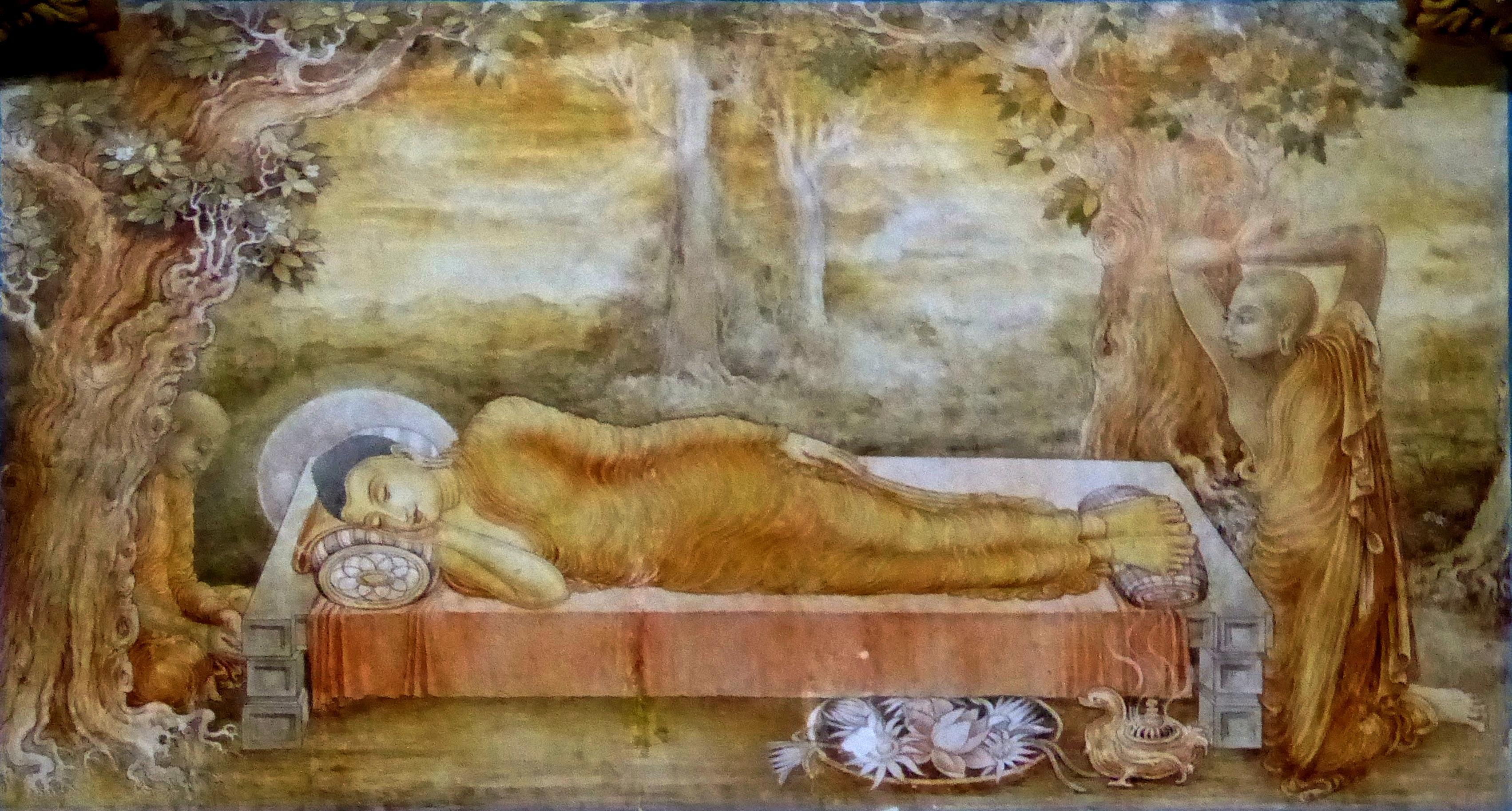 114 Passing with Ananda and Mahakassapa, Kelaniya Raja Maha Vihara